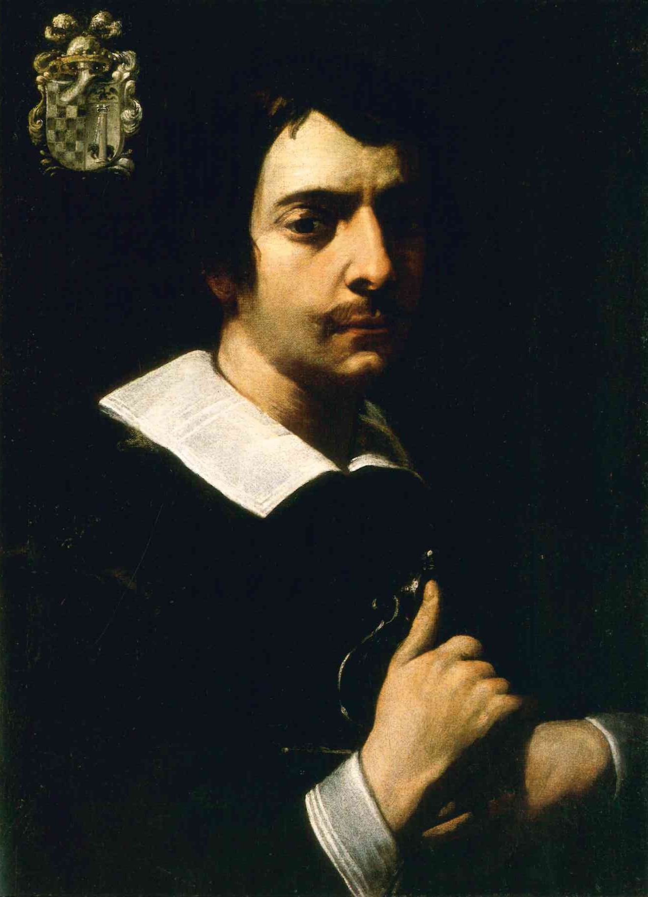 Ritratto di Pietro Cesarini (XVII sec.) di Giovanni Baglione